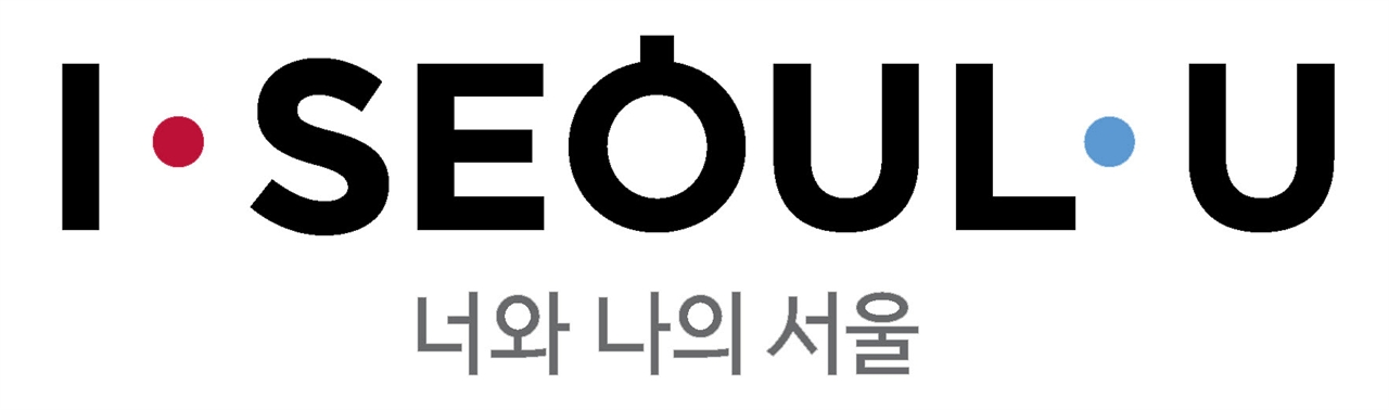 서울의 새로운 슬로건.